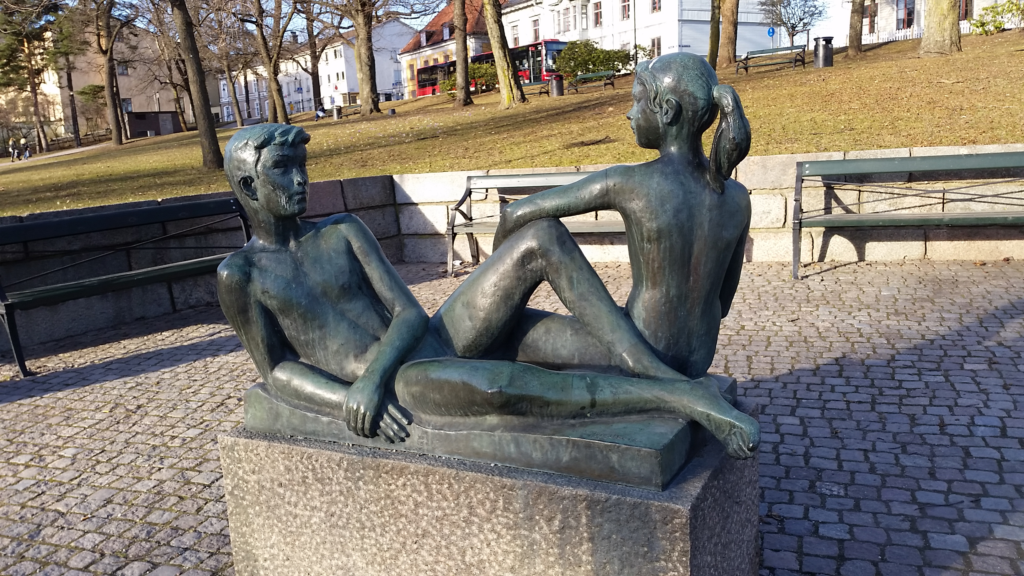 Ungdom (1957) - Rolf Kjellberg, Södertälje, Stadsparken This reproduction of an architectural work or work of art, is covered under the Swedish law of copyright for literary and artistic works (Law 1960:729, paragraph 24), which states that "Work of art may be depicted if it is permanently placed on or at a public place outdoors. Buildings may be freely depicted." See Commons:Freedom of panorama#Sweden for more information.